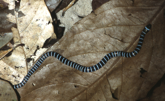 Annellated coral snake (Micrurus annellatus annellatus), in Panguana, Río Llullapichis, Dpto. Huánuco, Peru.